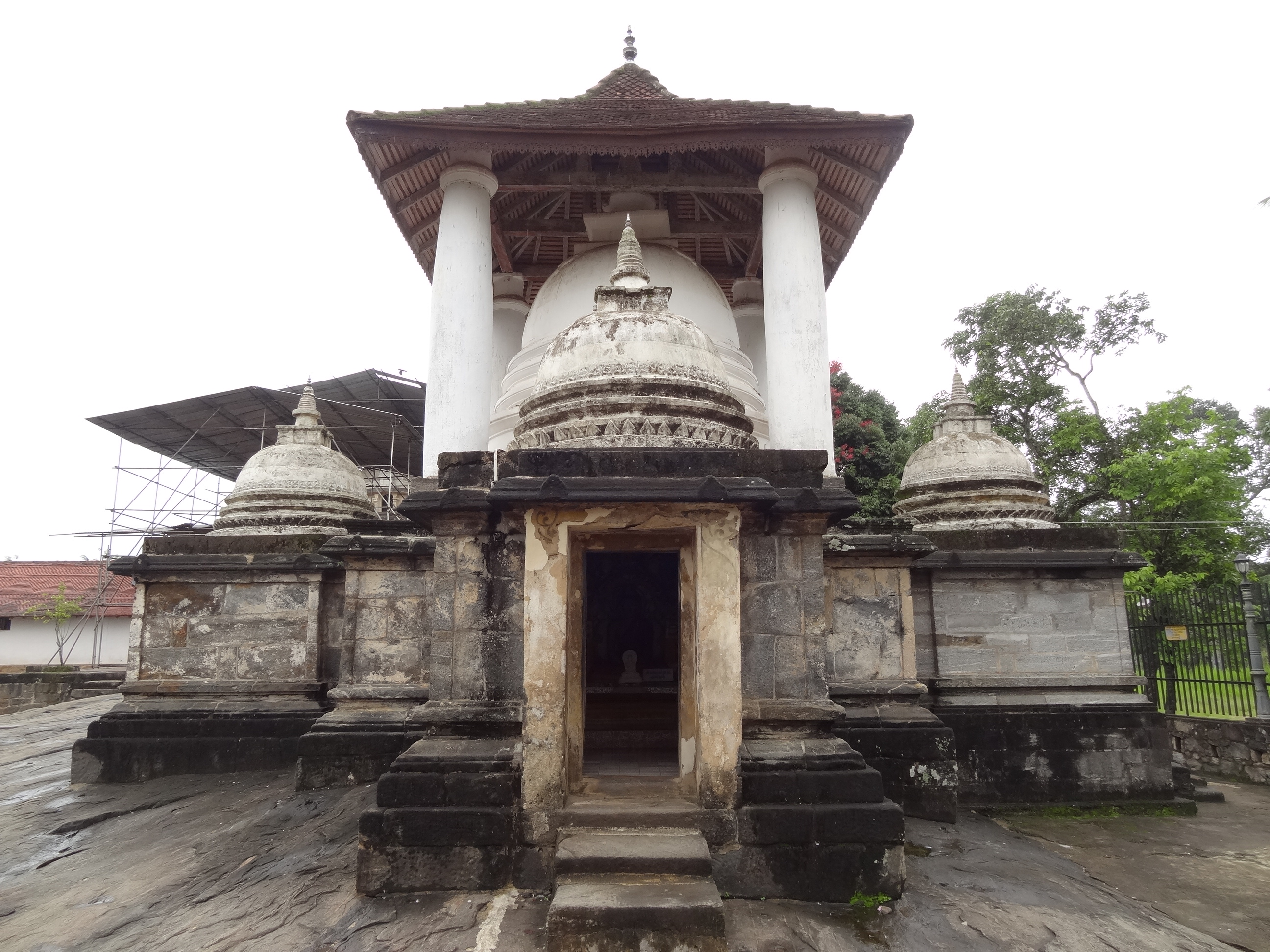 Gadaladeniya Viharaya